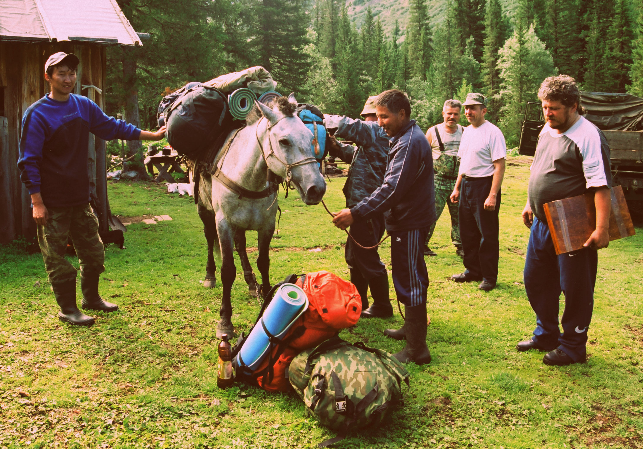 Туристы готовятся к походу на Жойган, у подножия перевала. Окинский район Бурятии, Забайкалье.